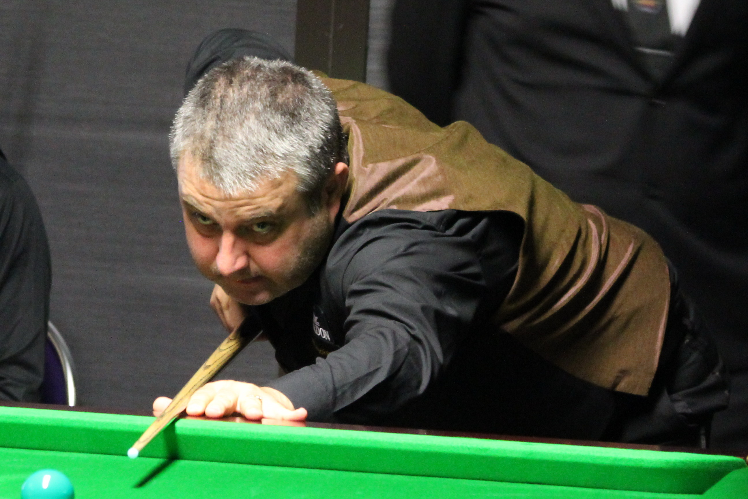 Rod Lawler beim Paul Hunter Classic 2016